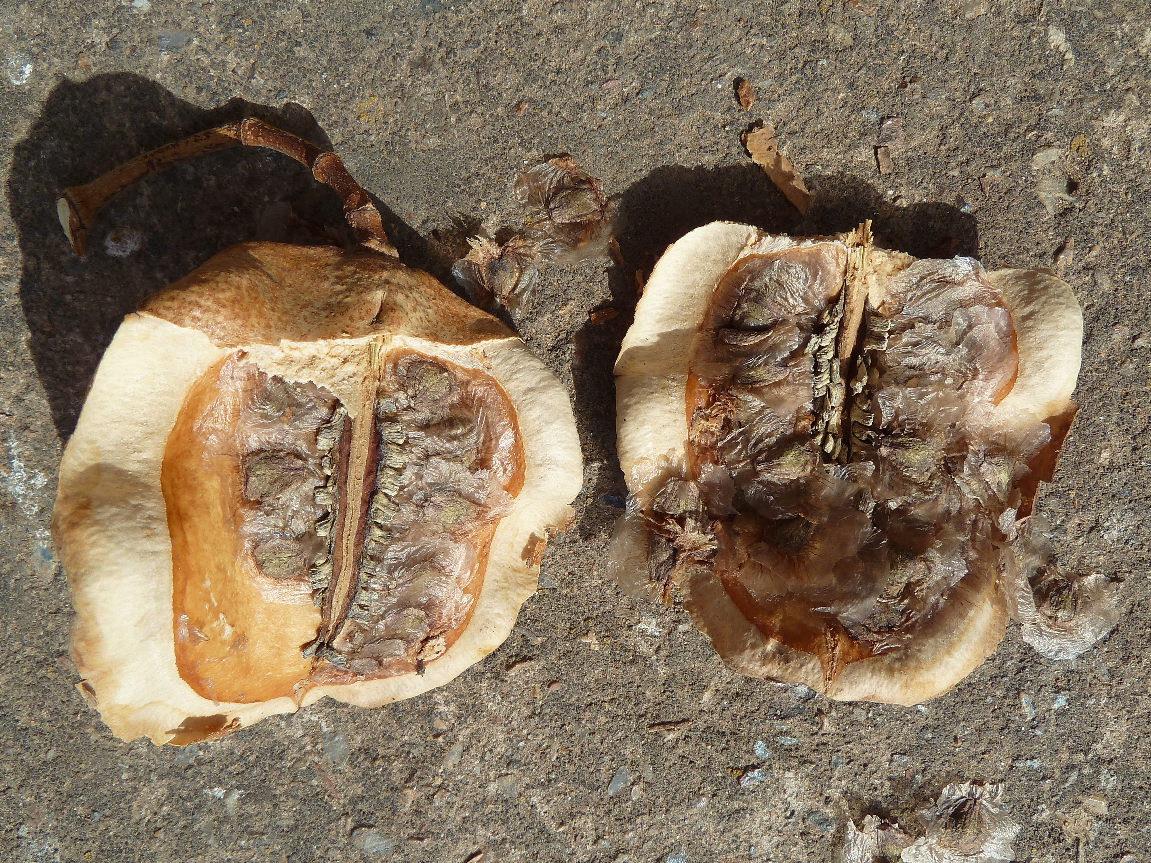 Jacaranda mimosifolia D.Don : Fruto abierto con semillas - Rambla del Charco, Águilas (Murcia, España).